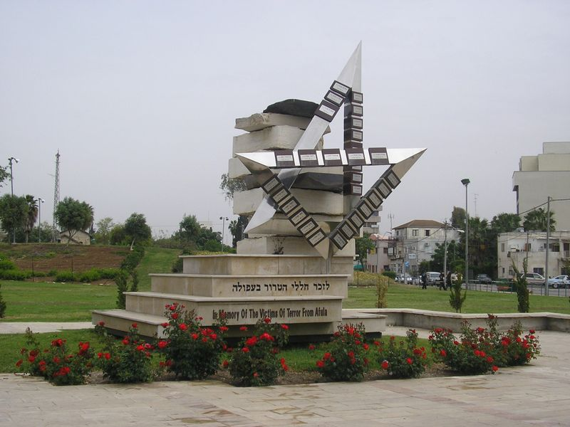 אנדרטה לחללי הטרור בעפולה. צולם על ידי